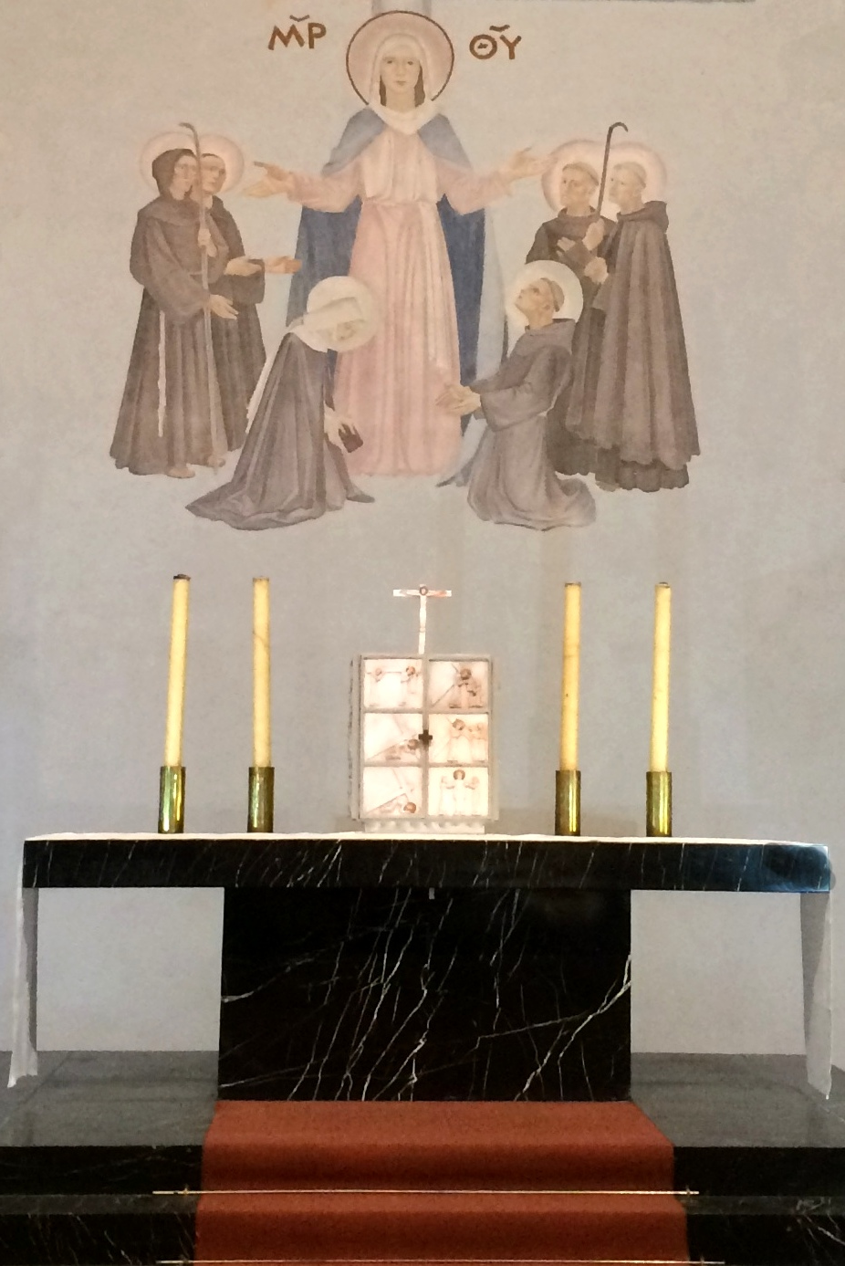 Altar Kloster Garnstock in Baelen (Eupen) Belgien, mit Keramik-Tabernakel von Maria Hasemeier-Eulenbruch